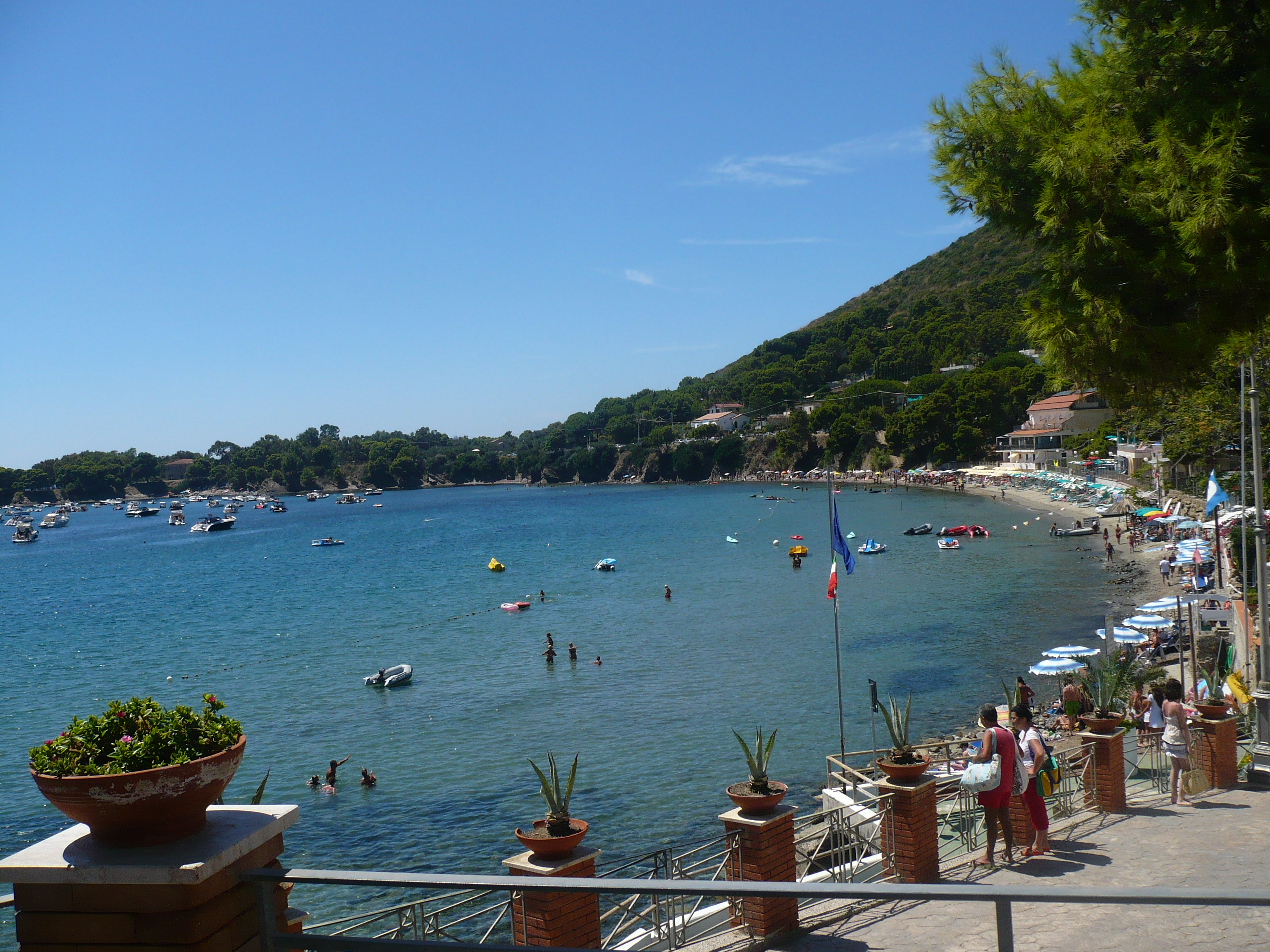 La punta di ogliastro